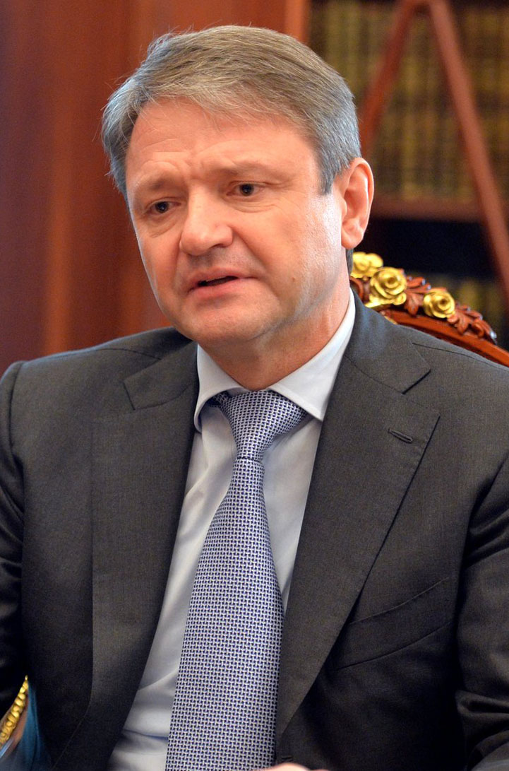 Министр сельского хозяйства Александр Ткачёв на встречи с Владимиром Путиным